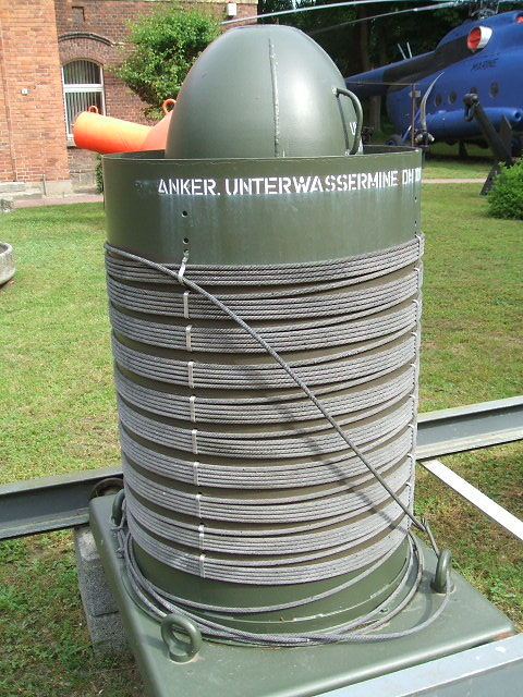 Stralsund, Marinemuseum.